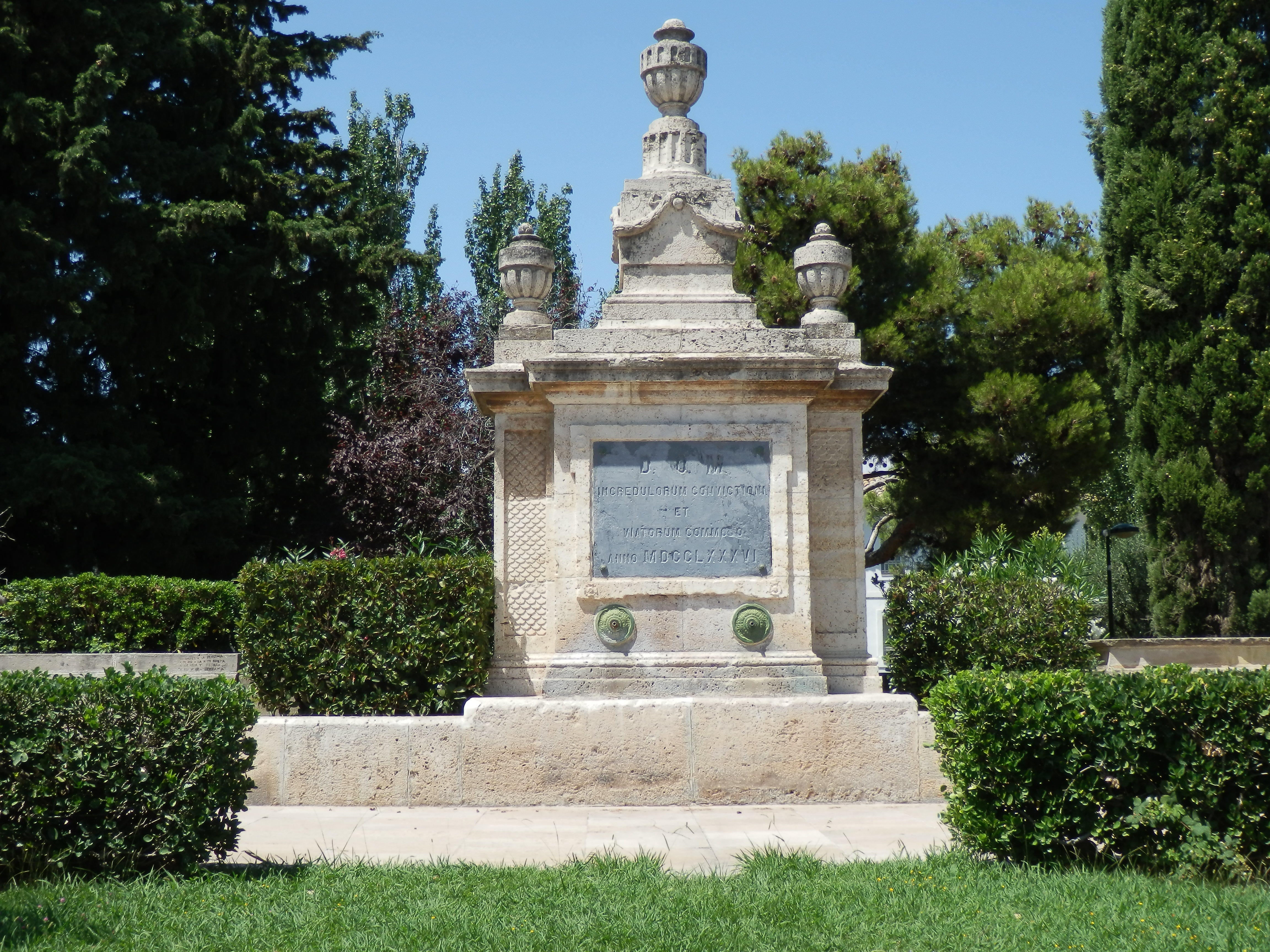 Fuente de los Incrédulos en la Vía Ibérica de Zaragoza. Contruida en 1786 tras la llegada del Canal Imperial de Aragón a Zaragoza. Dedicada a todos los que no creyeron que el proyecto se finalizaría con éxito.